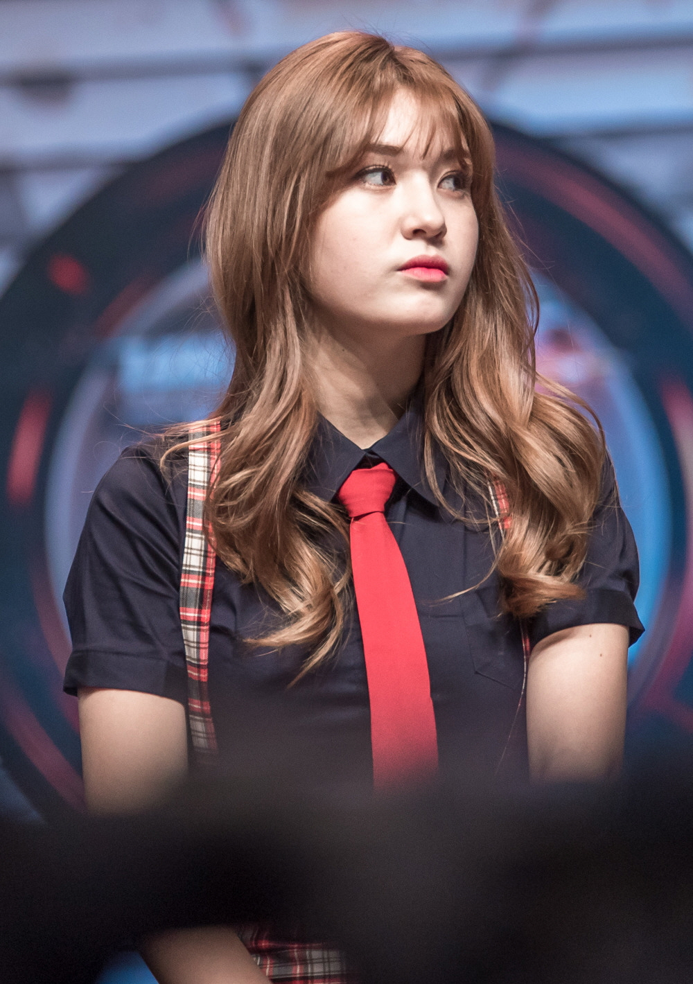 160521 백발백중 전소미 1pic